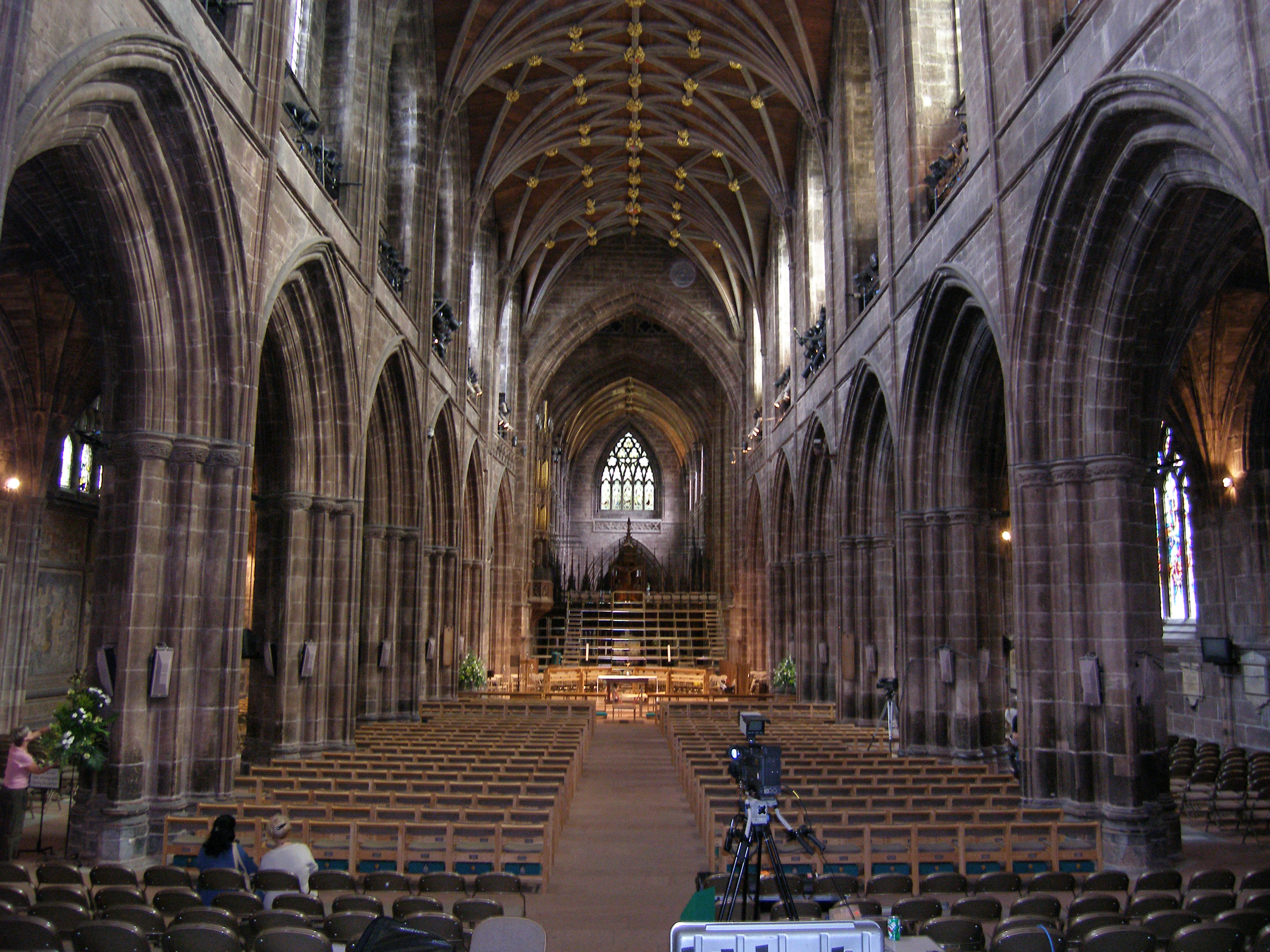 de kathedraal van Chester